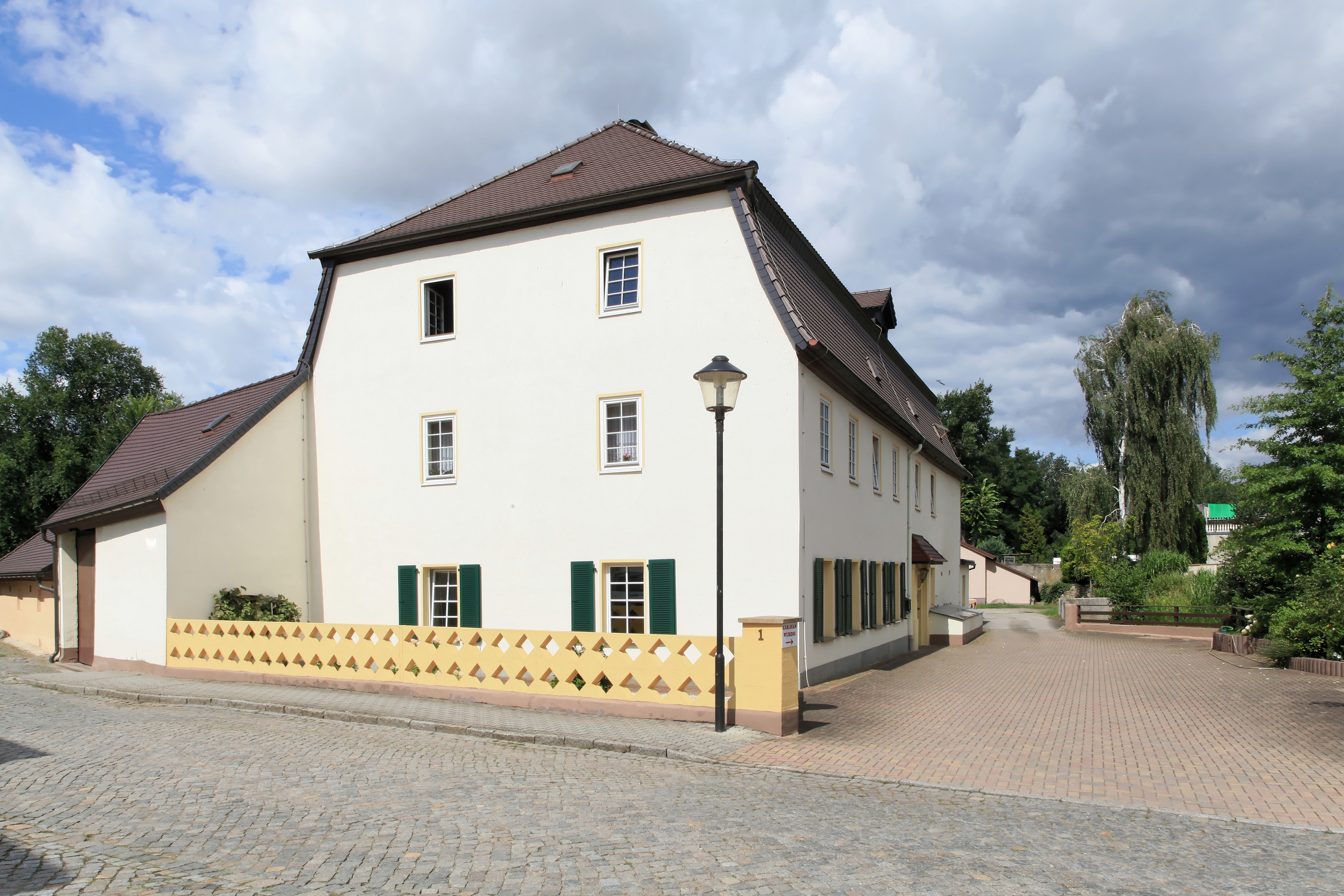 Stadtmühle, Am Lauch in Bad Düben)